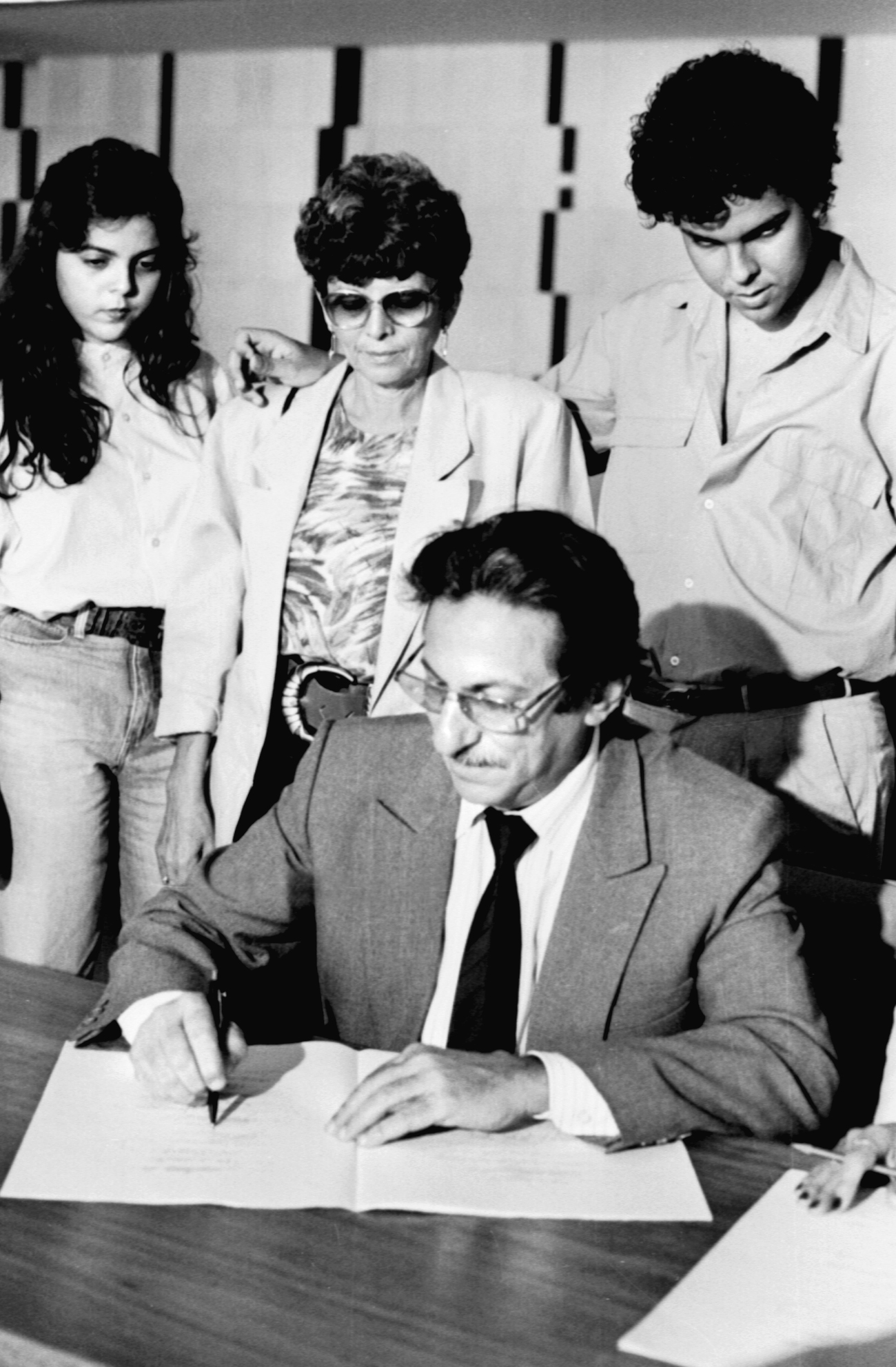 Assinatura da Constituição em 29/09/1988. Participantes - Senador Almir Gabriel, esposa e filhos. Foto: Célio Azevedo